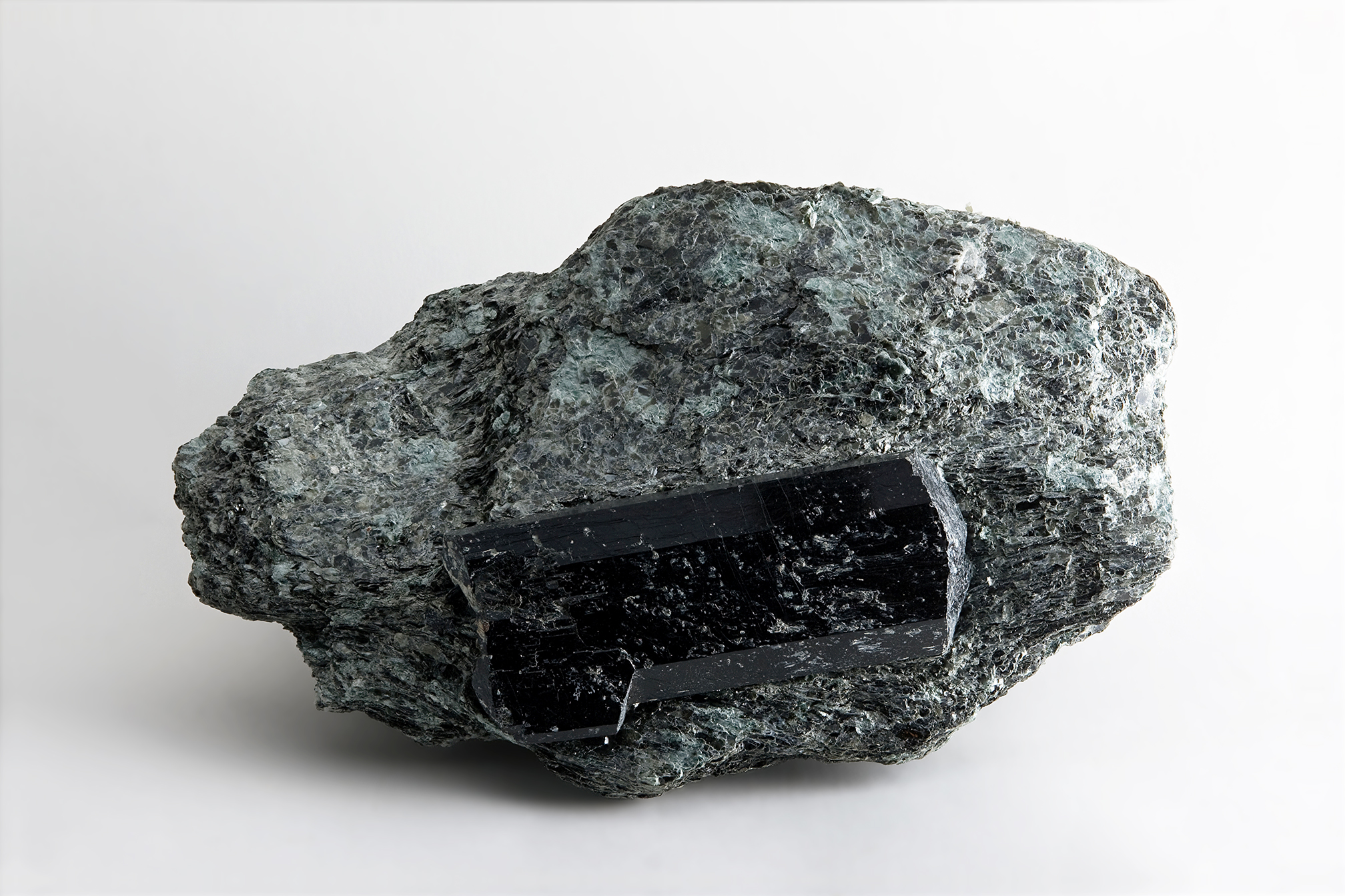 1.2 only